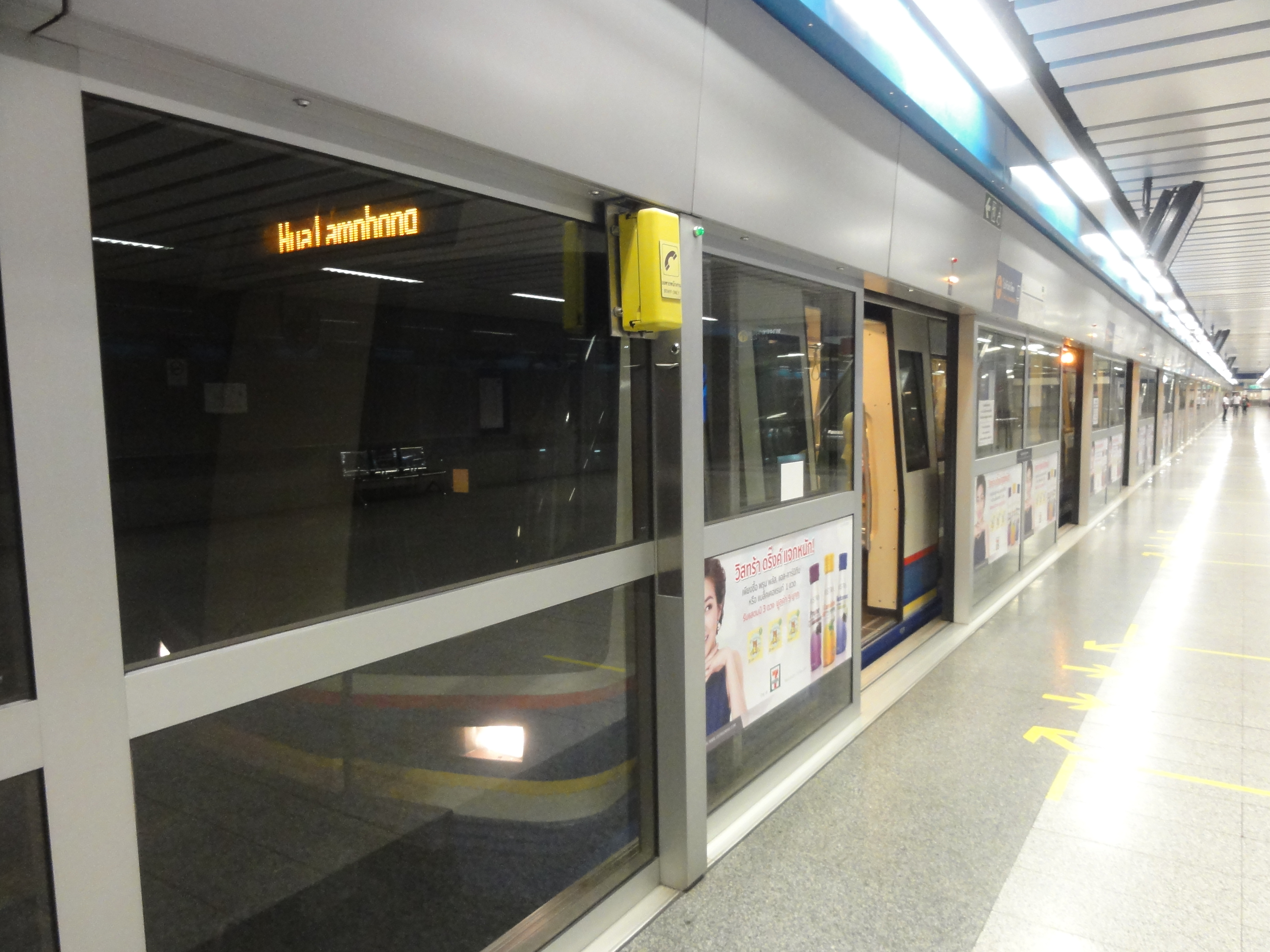 Bang Sue MRT Station